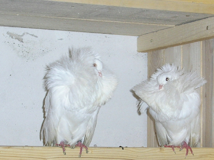 opis: par golubova pasmine periker izvor: slikao Ä lan Wikipedije Autor: Ä lan Wikipedije Palmofan ObjaÅ¡njenje: Slika prikazuje moje golubove i slikana je u mom golubnjaku